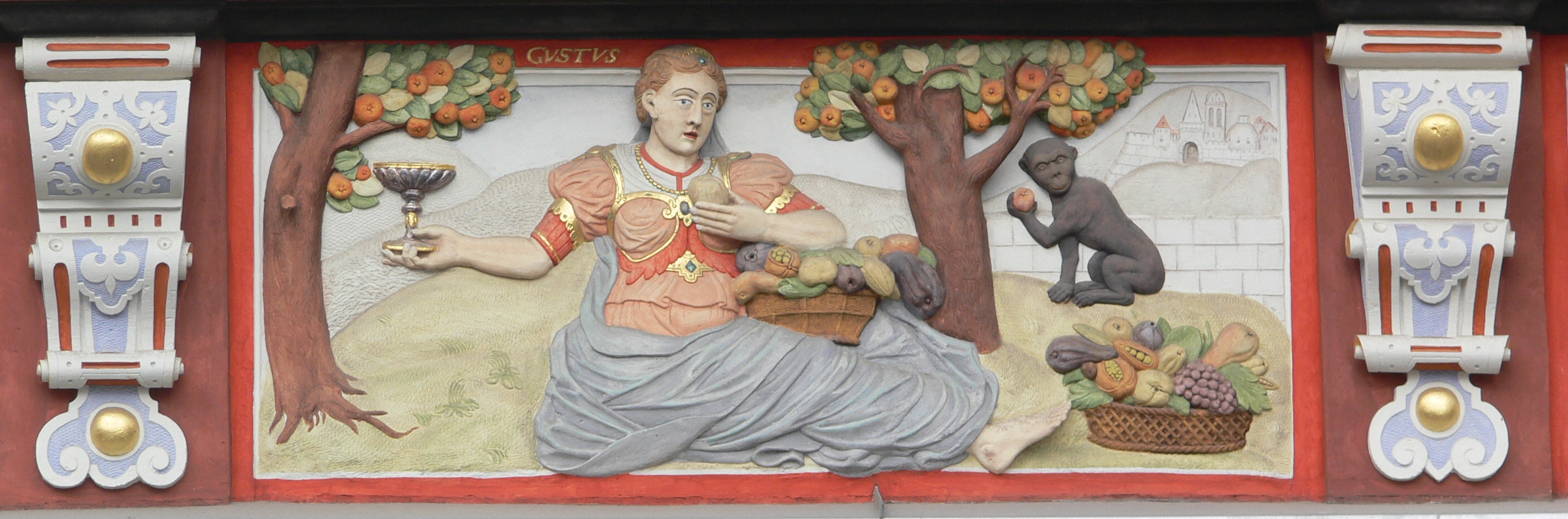 Haus "Zum Breiten Herd" am Fischmarkt in Erfurt Fassadendetail: Relief "Gustus" (Geschmackssinn)